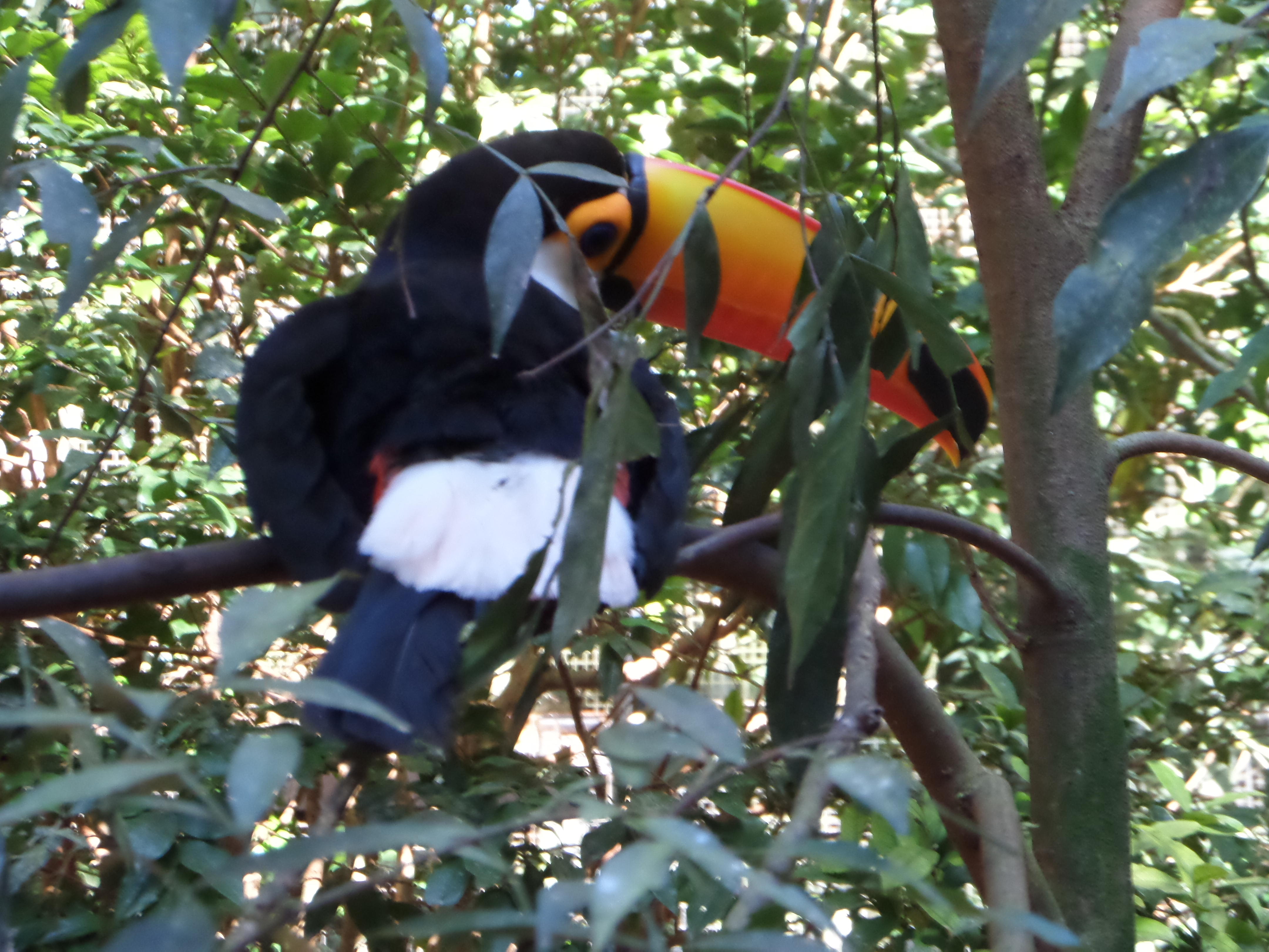 tucano do parque das aves em Foz do Iguaçú